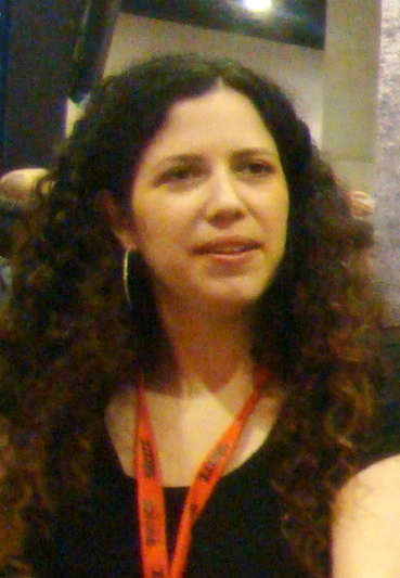 Maggie Friedman, Paul Gross & Jaime Ray Newman